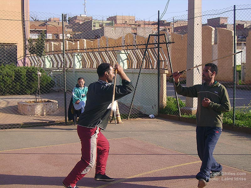 Une séance d'entrainement de matrag au complexe sportive à proximité de Ghriss.